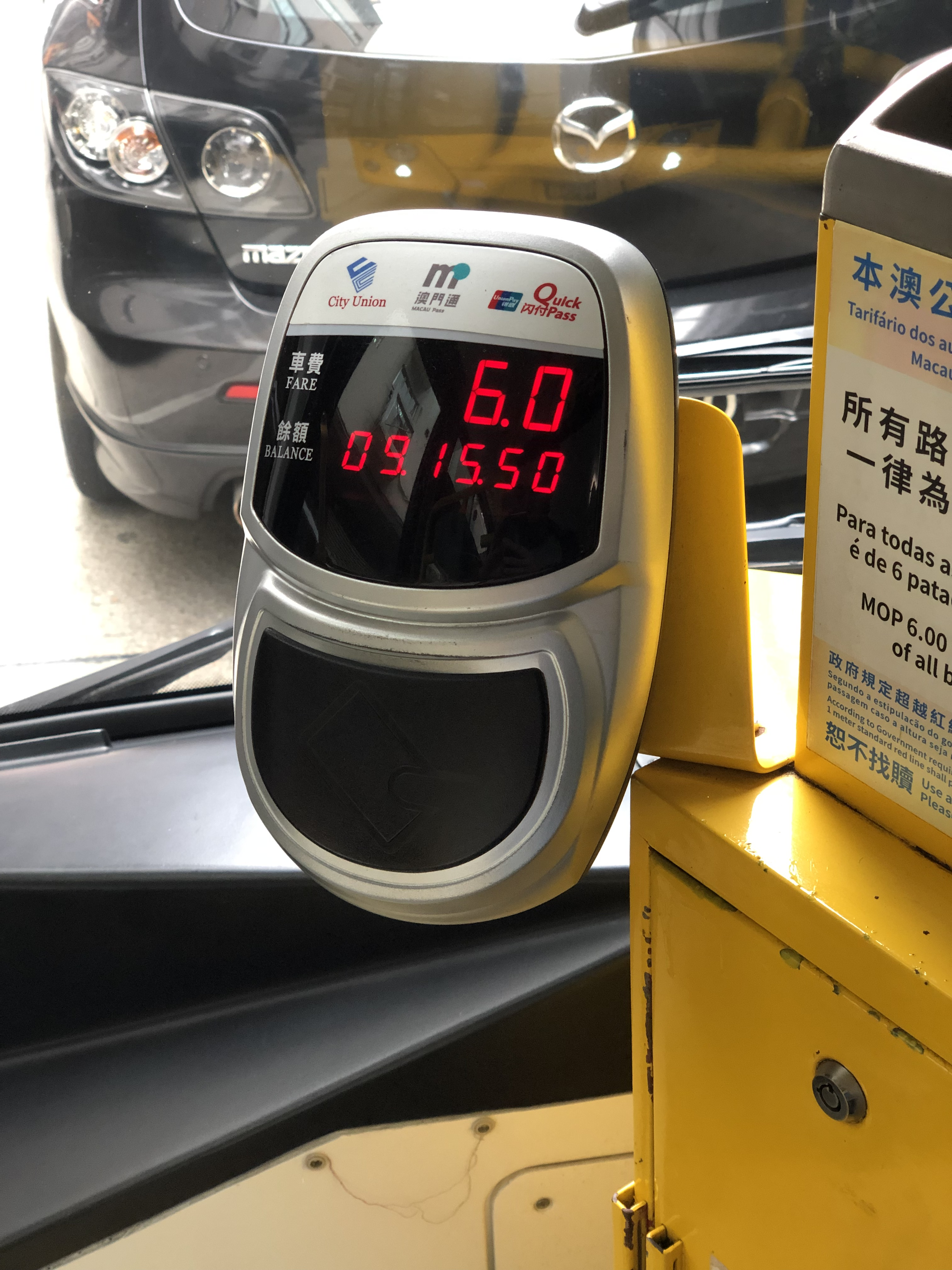 現時使用中的澳門通收費機。